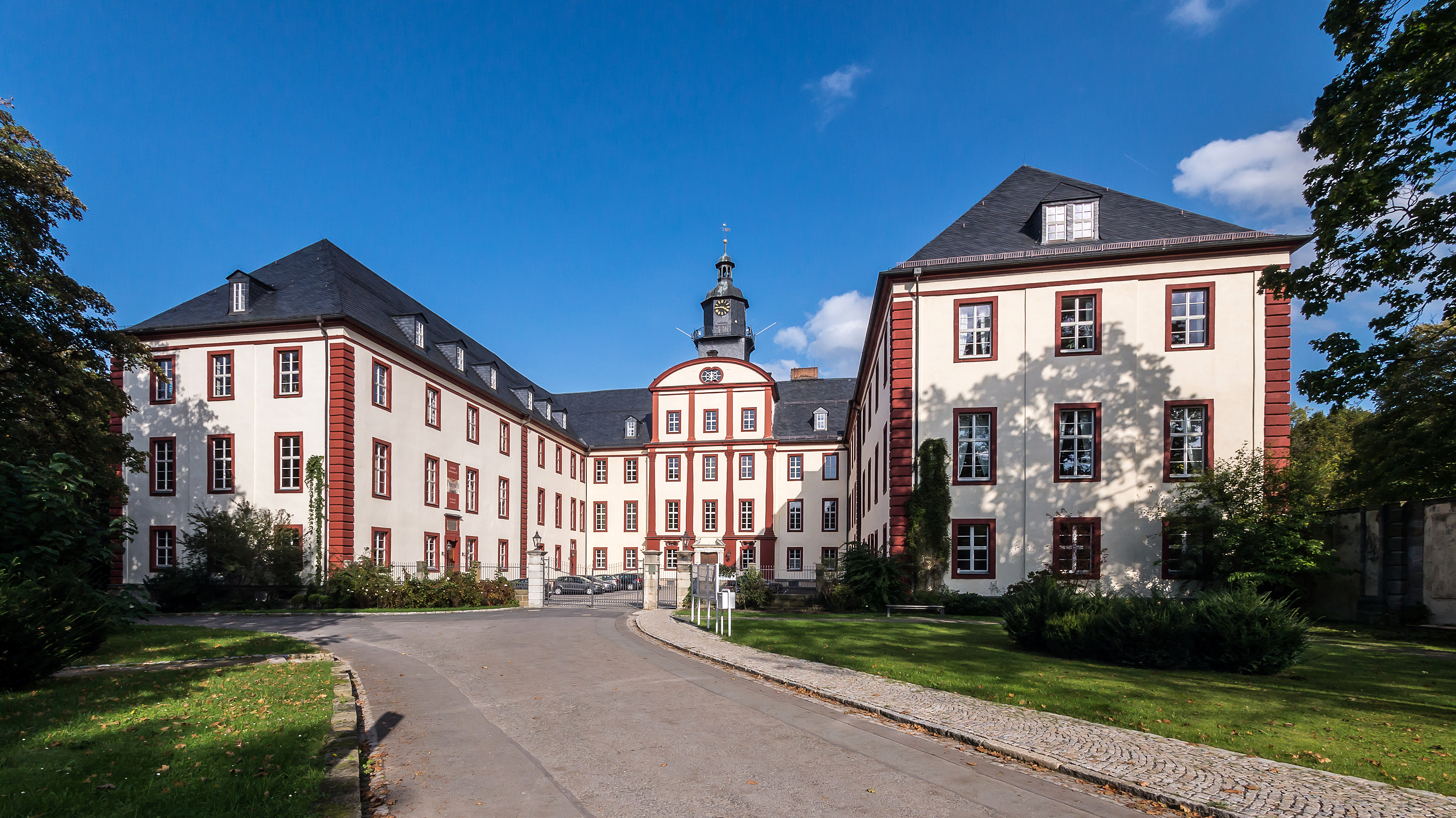 Saalfeld Schloßstraße 24 Schloss - Bestandteil Sachgesamtheit "Schloss und Park Saalfeld/Saale"